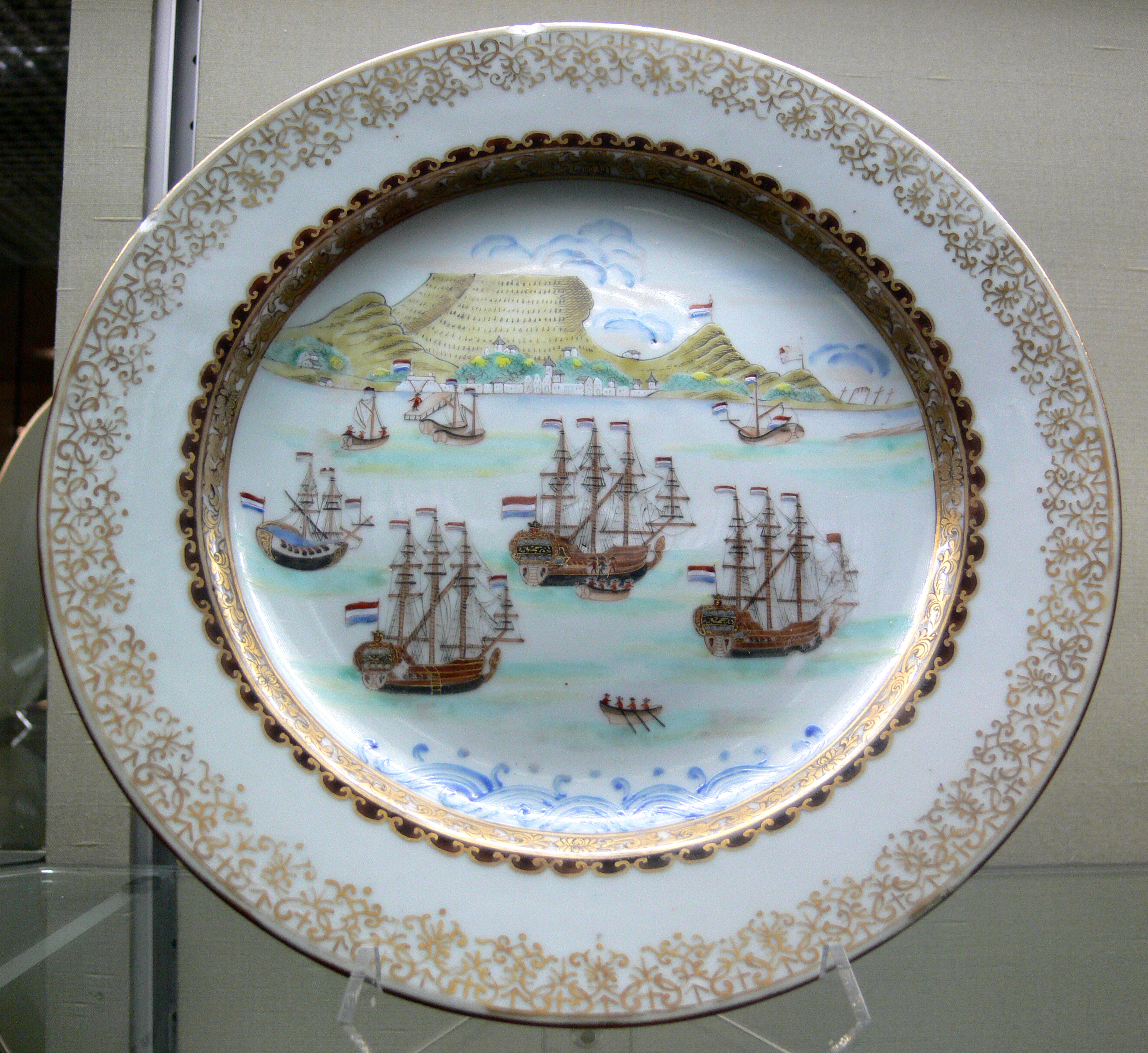 Teller mit holländischen Schiffen vor Kapstadt, dem Urteil des Paris; Schmelzfarbenmalerei und Goldspitzendekor im Stil J. G. Höroldts (Meißen); Porzellan aus Jingdezhen, für den Export nach Europa gefertigt, bemalt in Kanton bzw. Honan (18. Jahrhundert) Kunstgewerbemuseum Berlin, Inv. Nr. 88,571